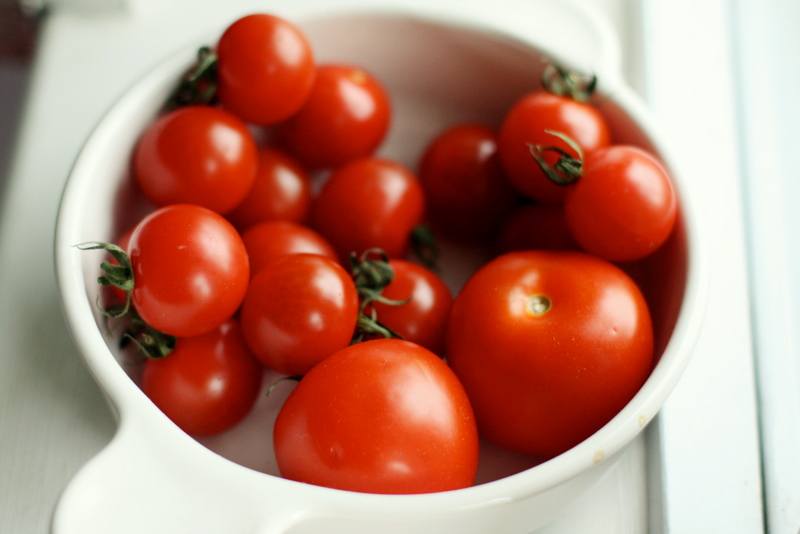 Tomatos